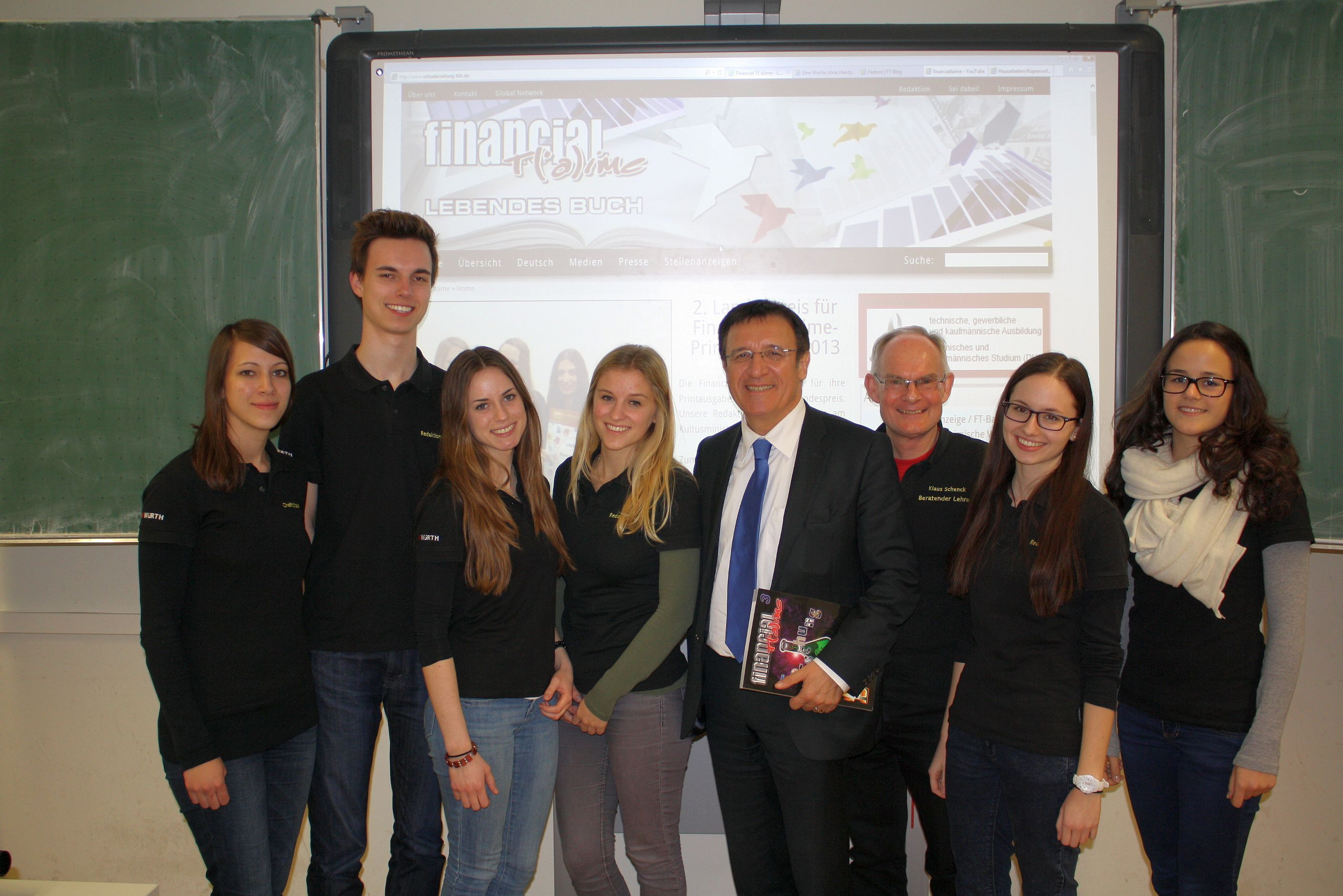 Wolfgang Reinhart, ein deutscher Politiker (CDU), seit Mai 2016 der Vorsitzende der Landtagsfraktion der CDU Baden-Württemberg, ehemaliger Minister für Bundes-, Europa- und internationale Angelegenheiten sowie Bevollmächtigter des Landes Baden-Württemberg beim Bund, besuchte die Financial T(’a)ime, Schülerzeitung der Kaufmännischen Schule Tauberbischofsheim.